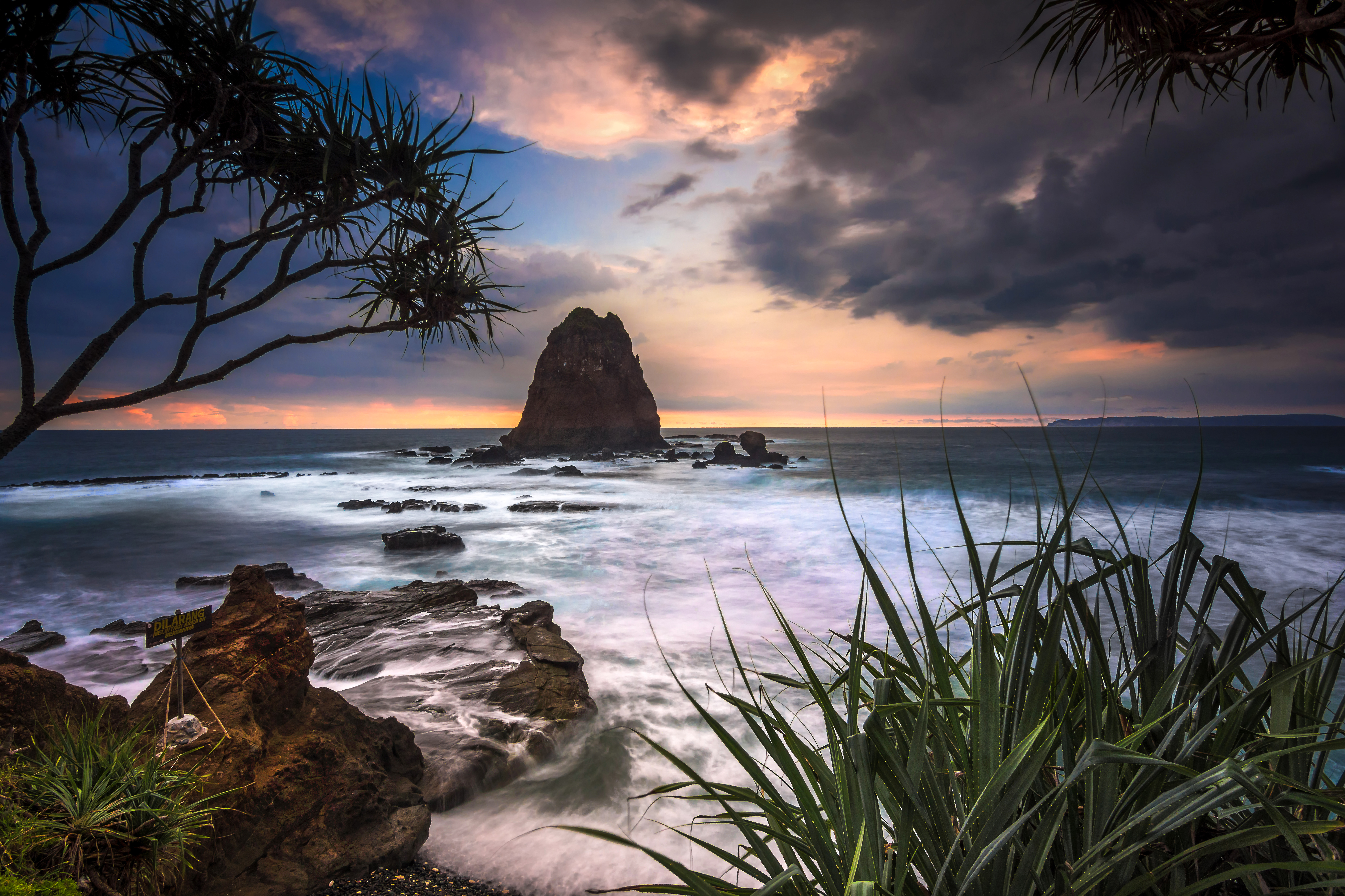 salah satu pantai yang memiliki pemandangan yang indah di kota jember jawa timur